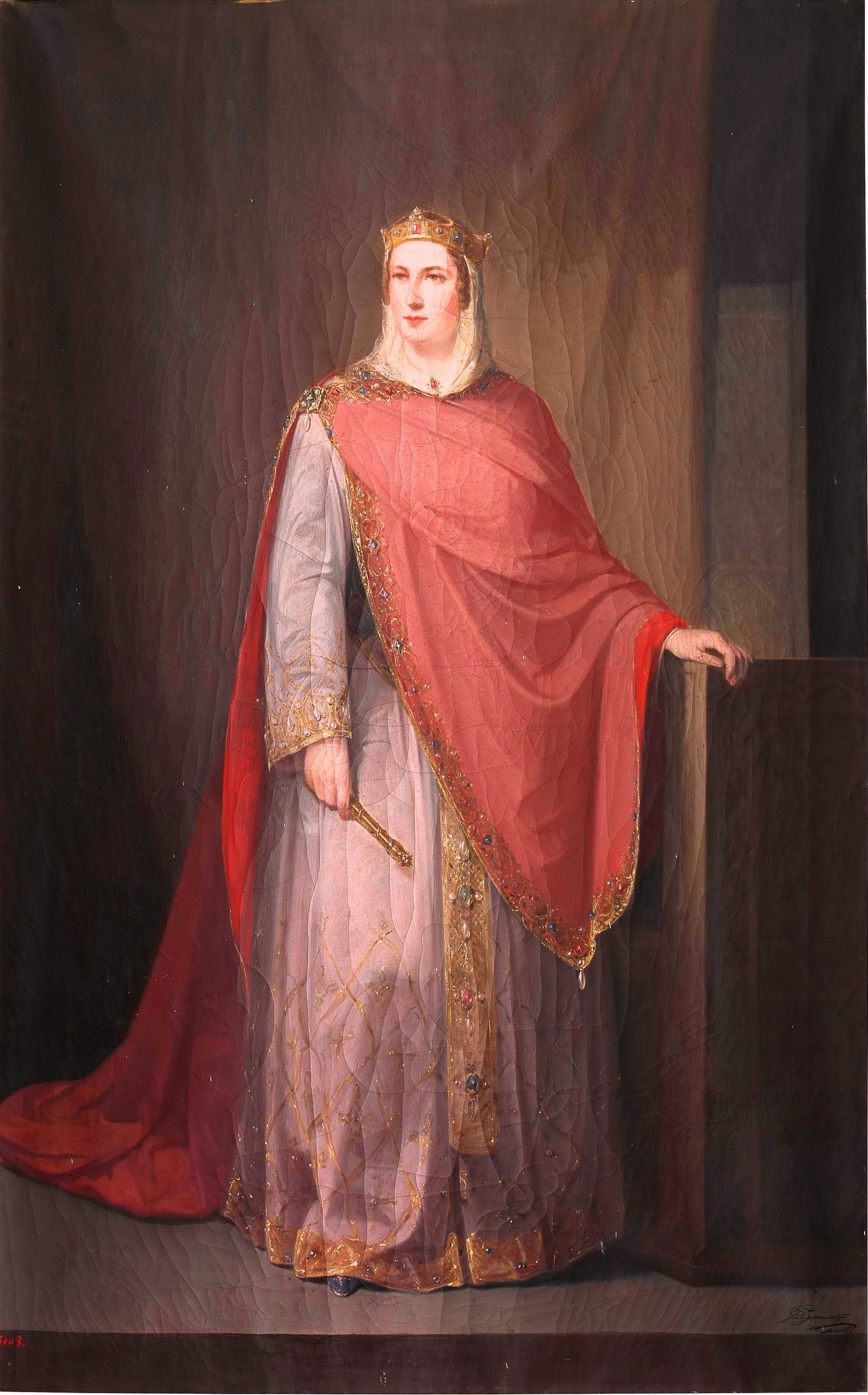 Retrato imaginario de Ermesinda, que fue reina consorte de Asturias por su matrimonio con Alfonso I el Católico y era hija del rey Don Pelayo y de la reina Gaudiosa.